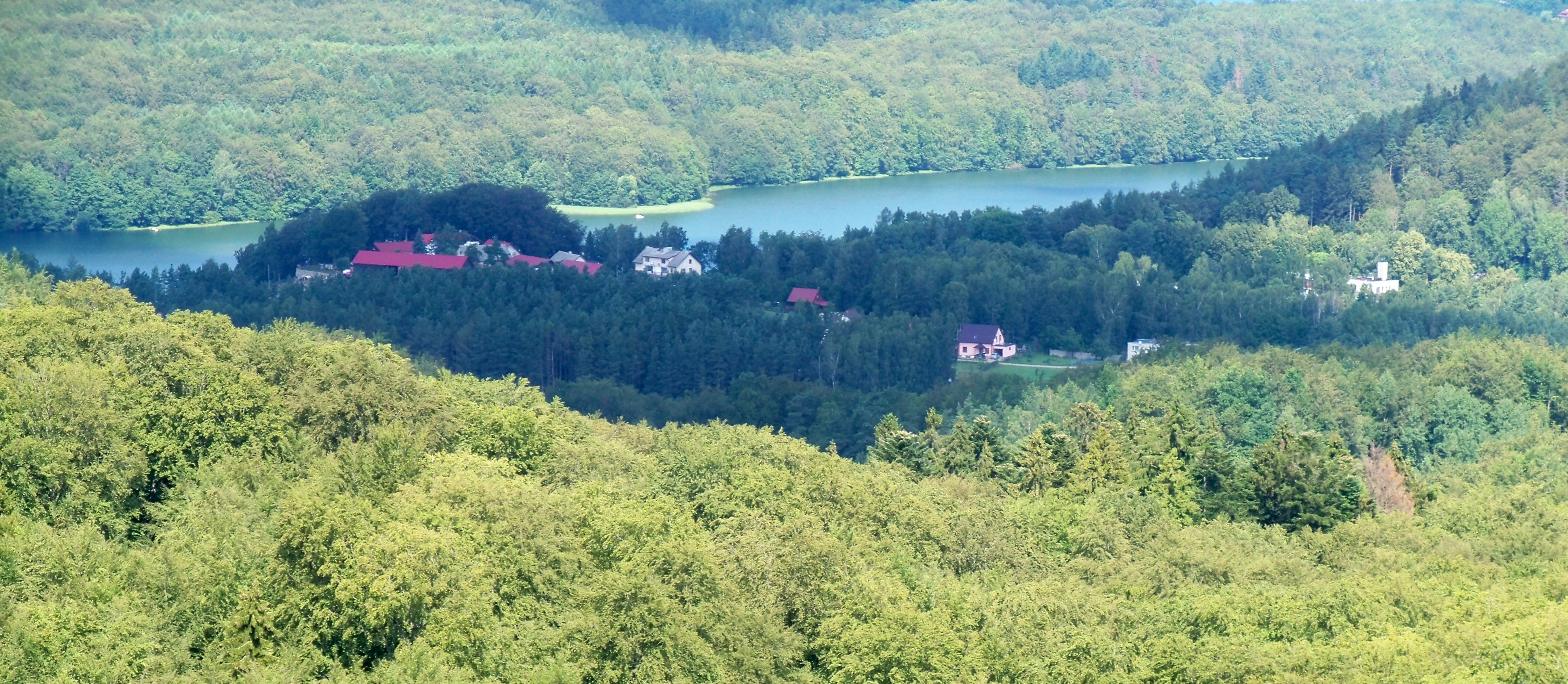 Widok z Wieżycy na Jezioro Ostrzyckie This is a photography of Natura 2000 protected area with ID PLH220095